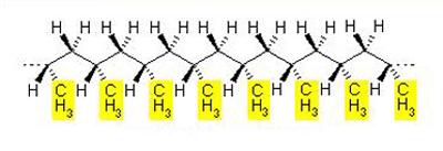 polypropylen isotaktisch